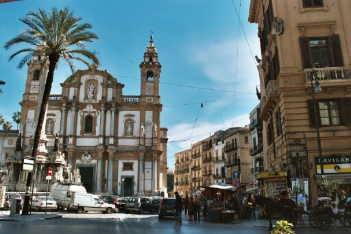 Palermo, Sicilia, Italia